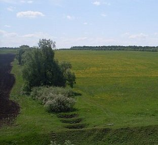 Татарча/tatarça: Иске Чәчкаб янында